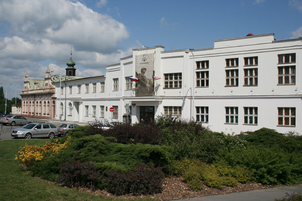 Kulturní dům Peklo v Plzni, okres Plzeň-město, Česká republika